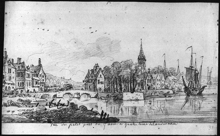 Le port du Faou dans le département français du Finistère en 1776.